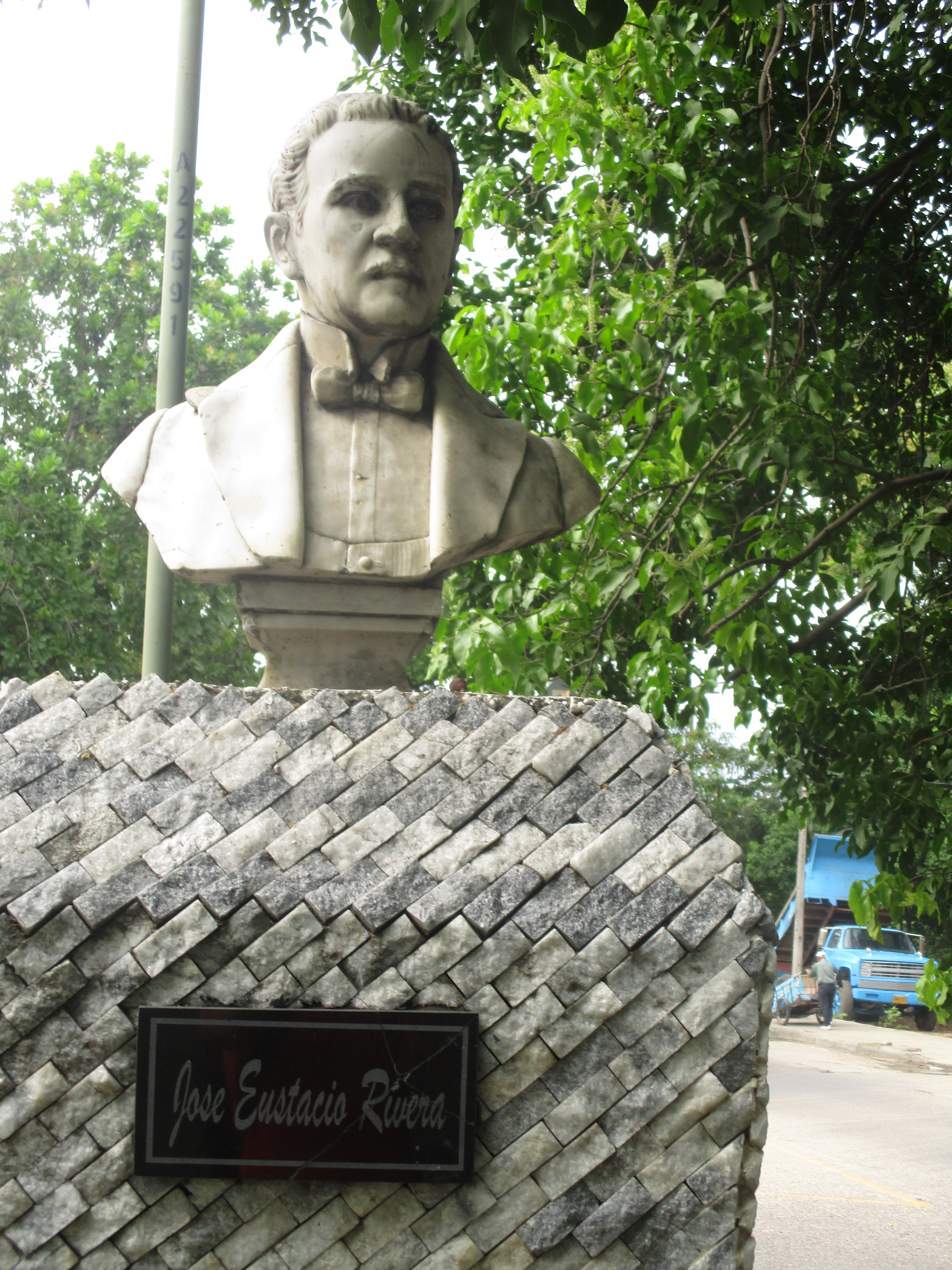 Esta fotografía fue tomada en el municipio colombiano con código 41001.